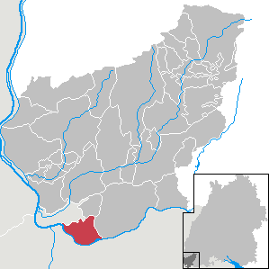 Grenzach-Wyhlen, Landkreis Lörrach, Baden-Württemberg